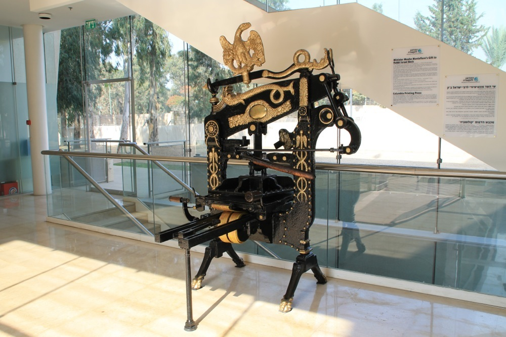 מכבש הדפוס הראשון בירושלים מתנת משה מונטיפיורי לרבי ישראל ב"ק מתוך המוזיאון לתקשורת, ביה"ס סמי עופר לתקשורת, הבינתחומי הרצליה